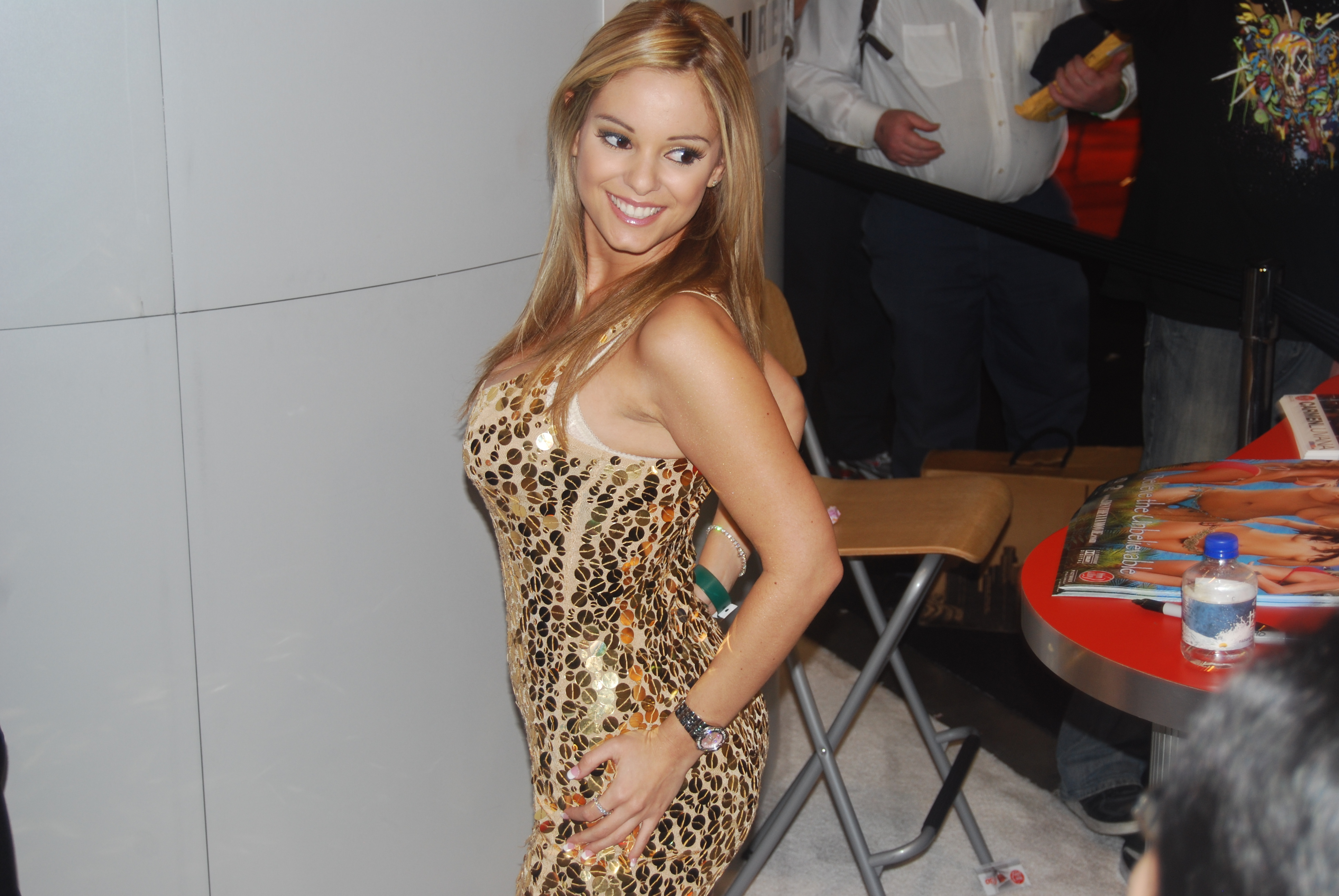 AEE2008_Nikon_Day2 584